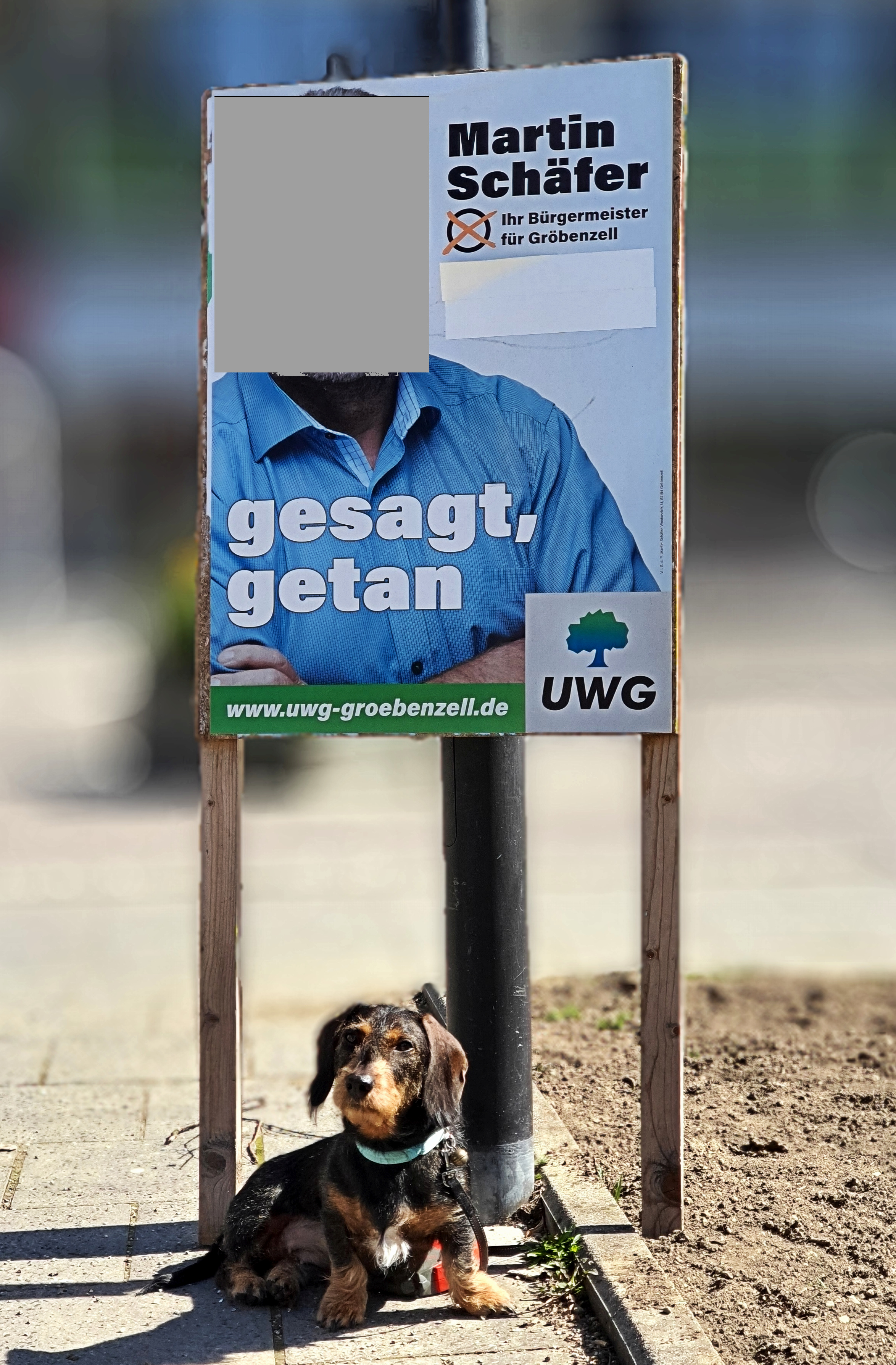 Gröbenzell, Wahlplakat Martin Schäfer